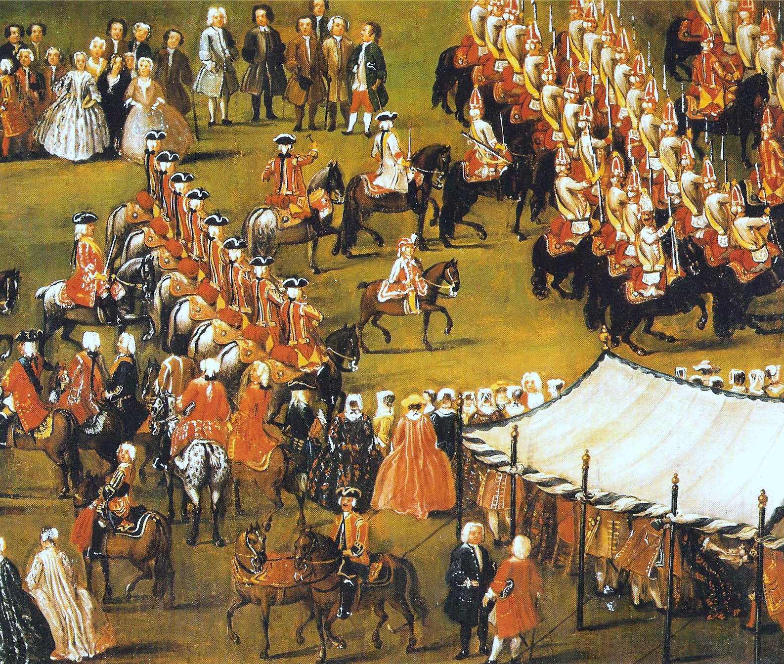 Georg II. von England (links/left) und Prinz Wilhelm August (Junge/boy) - Dragonerregiment von Wendt (D V) - Revue von Bemerode 1735 - Detail!